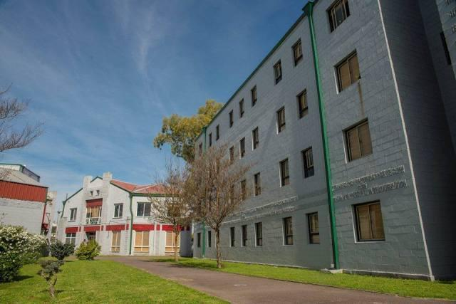 Vista central del Albergue Universitario de la UNLP, en la localidad de Berisso.